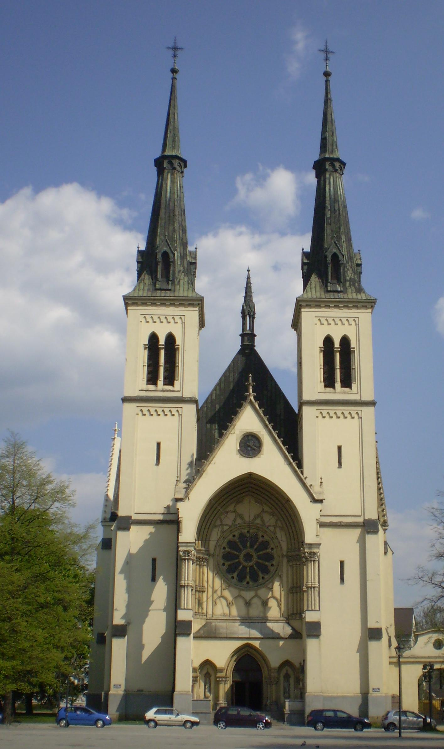 Kostel Neposkvrněného početí Panny Marie na Náměstí Svatopluka Čecha v Ostravě Přívoze. Pohled zepředu.